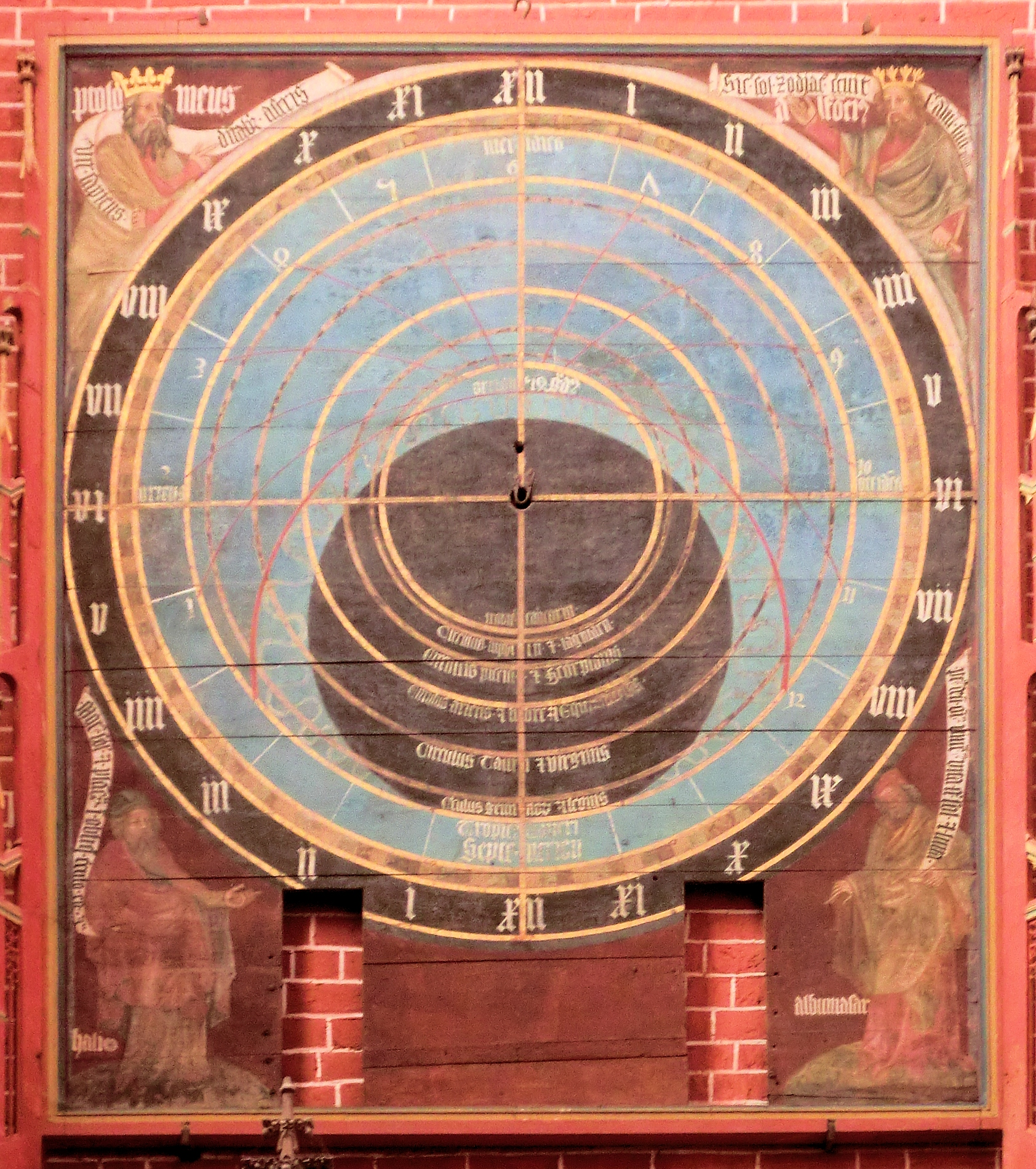 Bad Doberan Münster Astronomische Uhr